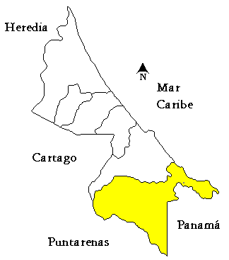 Mapa del cantón de Talamanca, provincia de Limón, Costa Rica